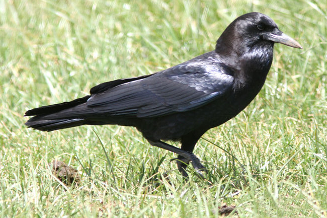 Corneille du cap